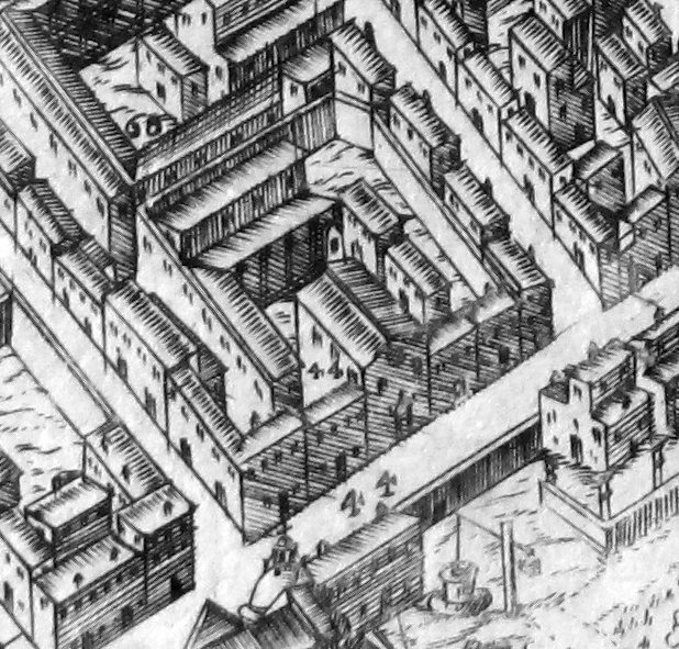 Pianta del buonsignori, dettaglio 044 capitolo monastero (Sant'Elisabetta del Capitolo)